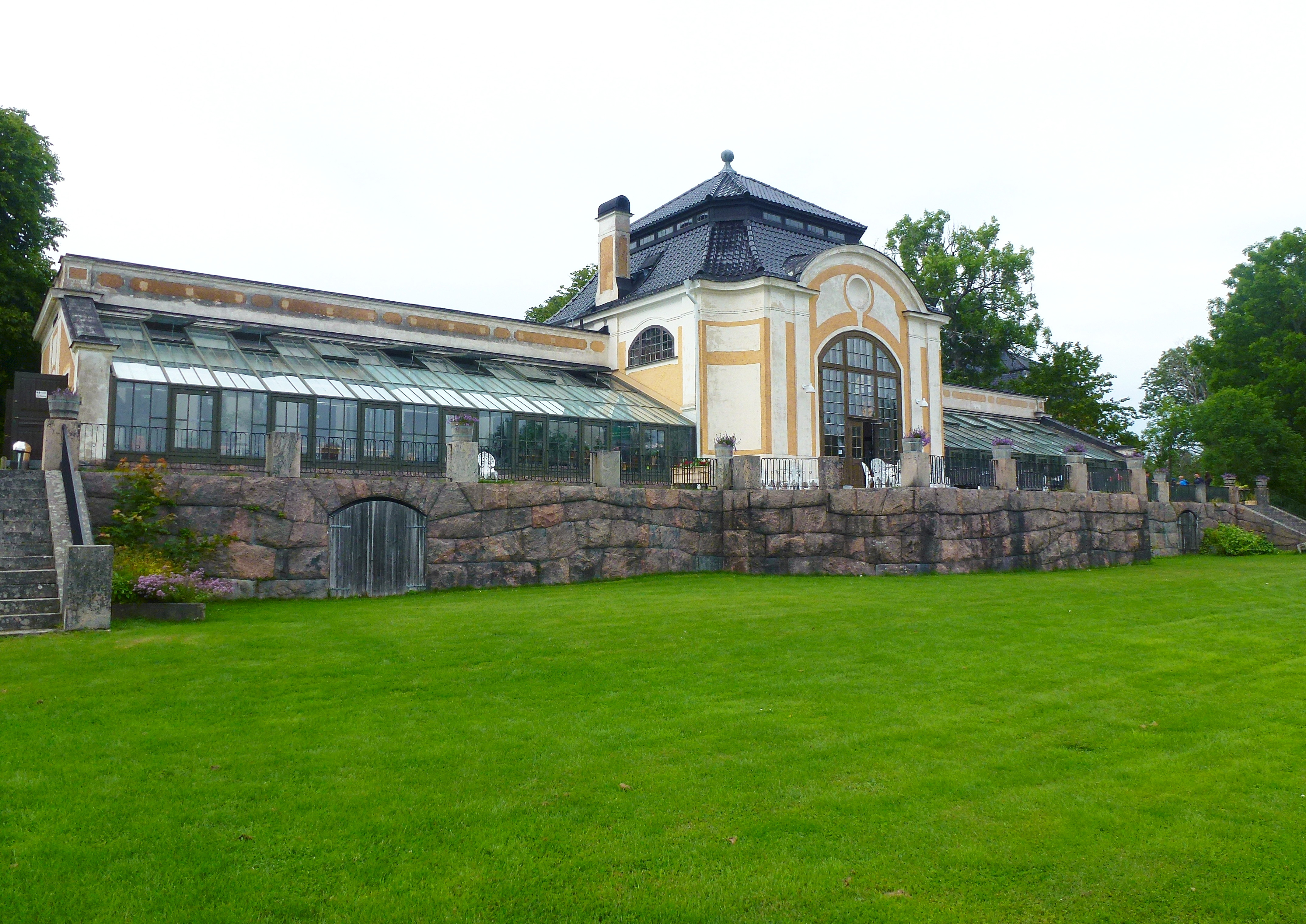 Nynäs slott, orangeri, arkitekt Isak Gustaf Clason